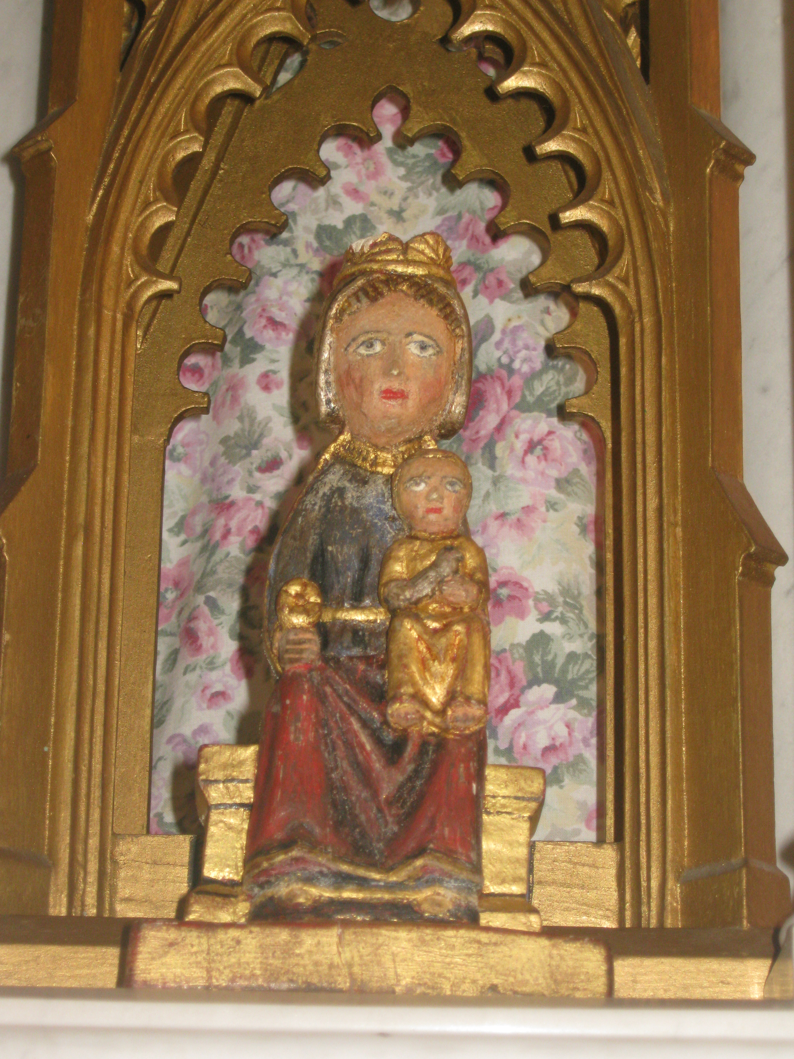 photo prise à la chpelle au retour de la procession 2012